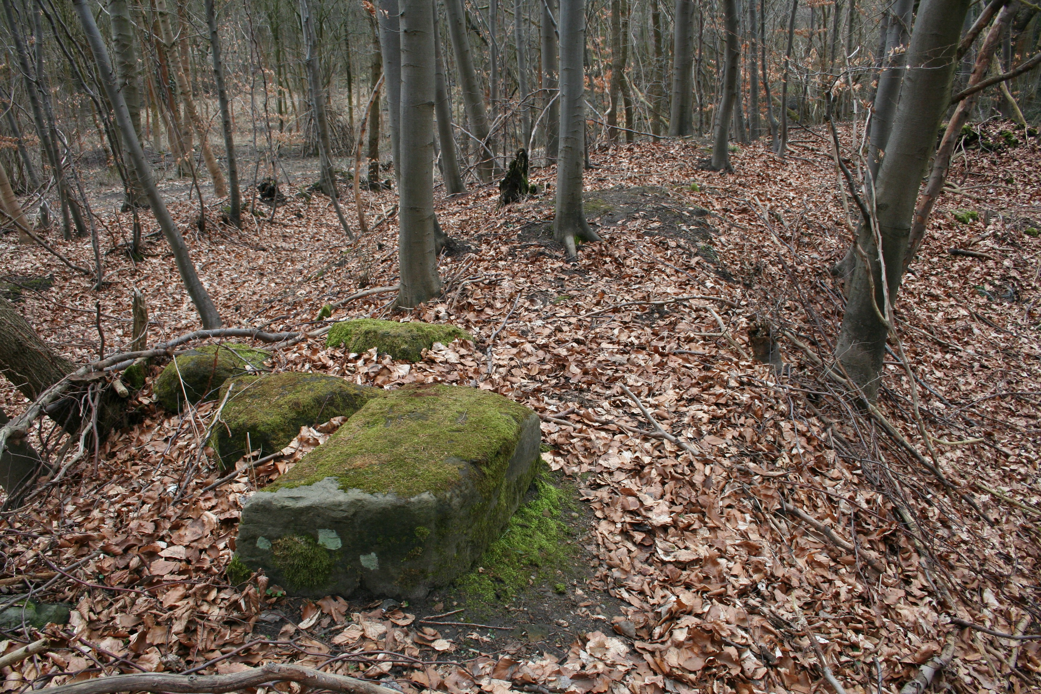 Reste einer Kapelle am Burgberge